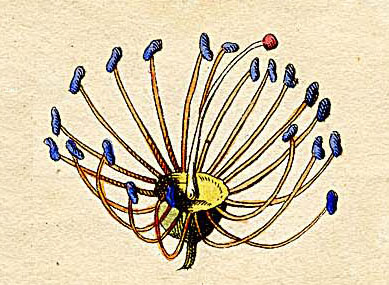 Ausschnitt (Klasse XII) aus Ehrets Tafel "Methodus Plantarum Sexualis"